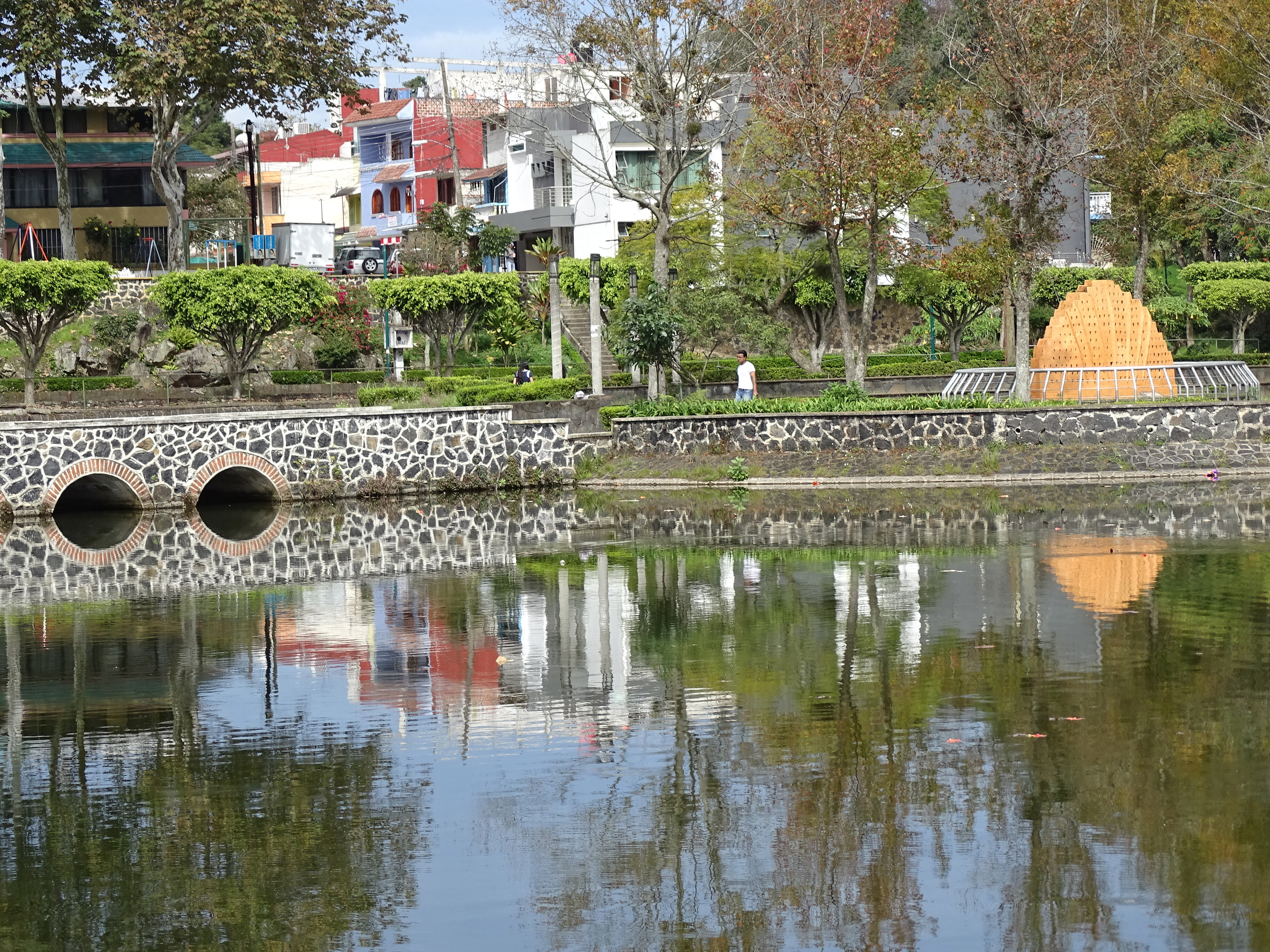 Park Scene - Paseo de los Lagos - Xalapa - Veracruz - Mexico - 06